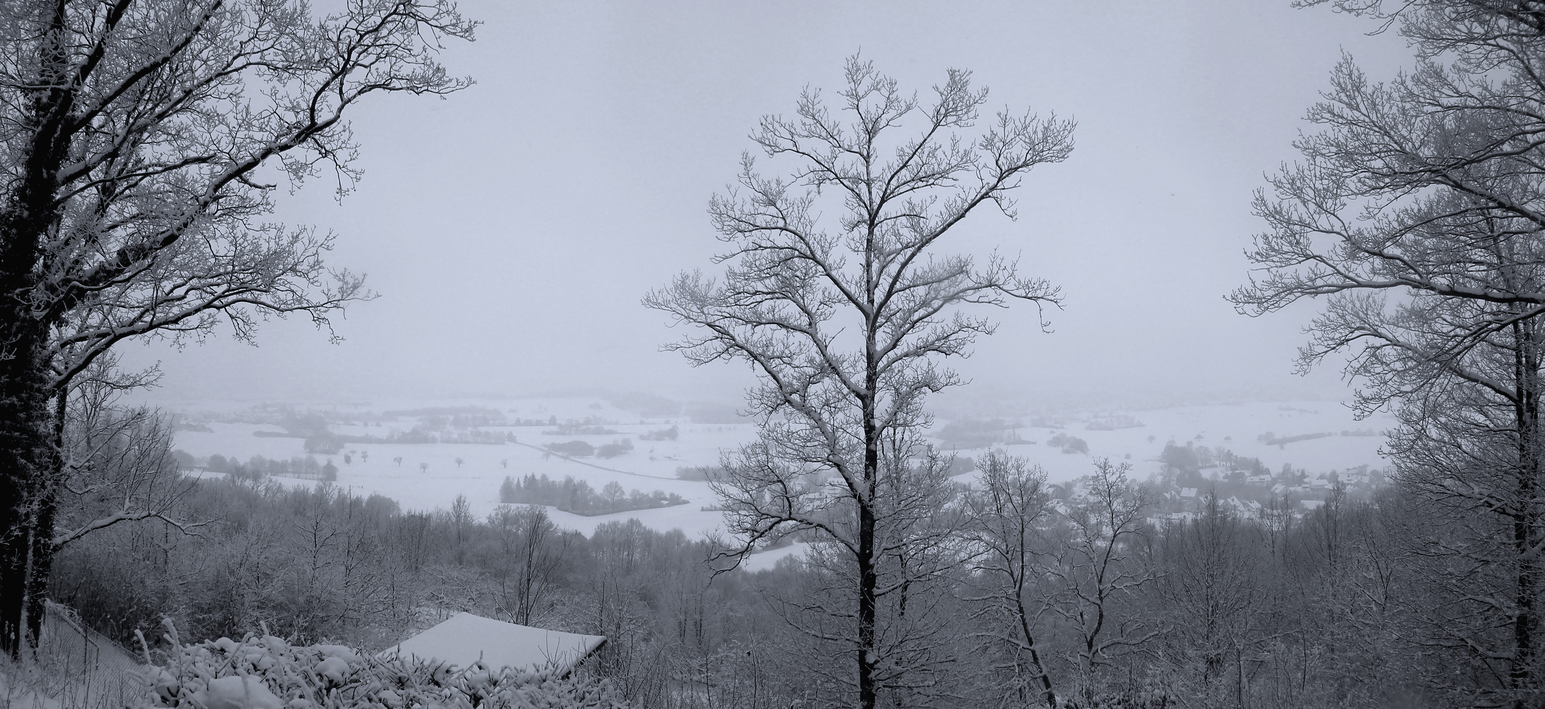 Franken in Winter